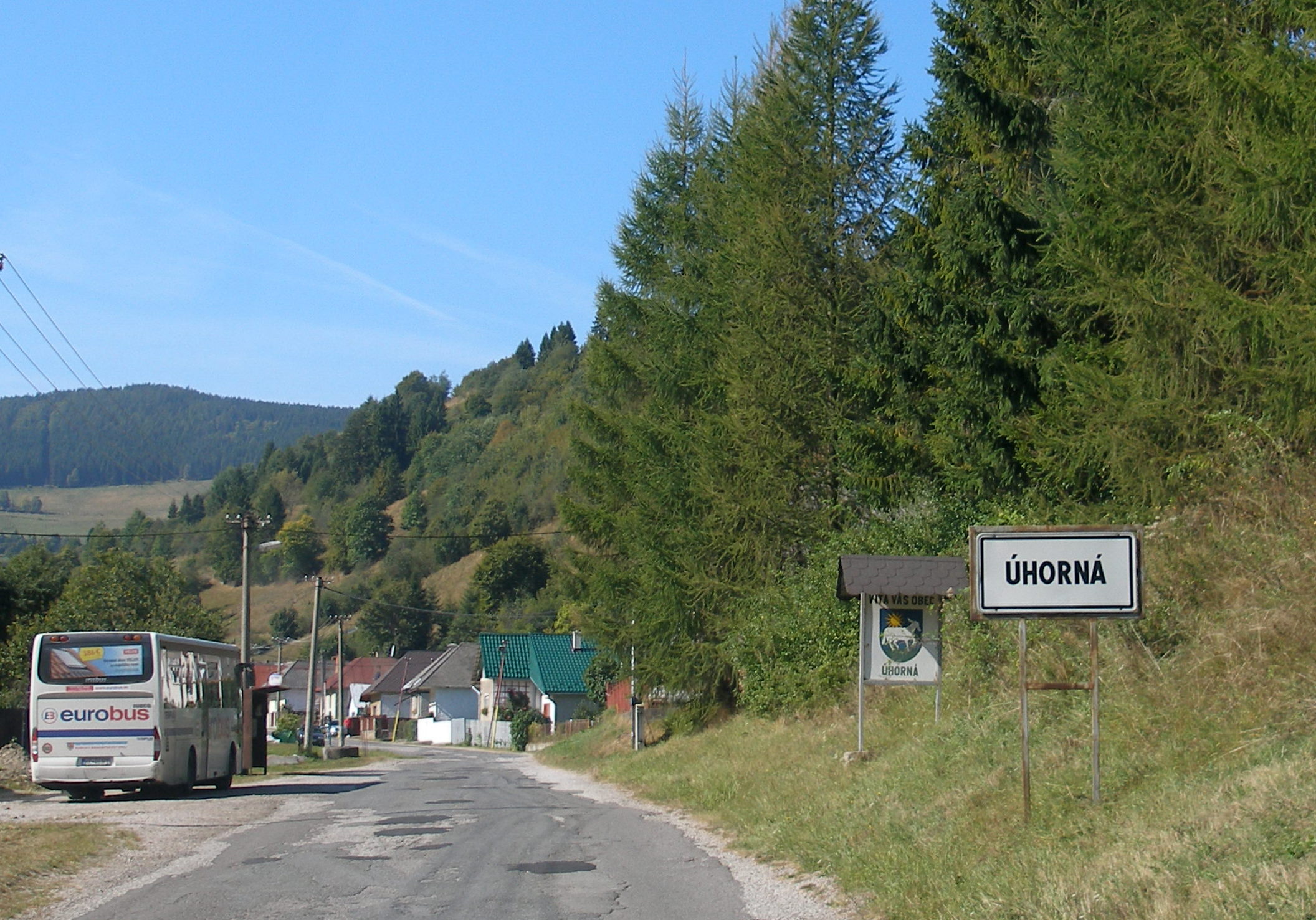 Obec Úhorná okres Gelnica.